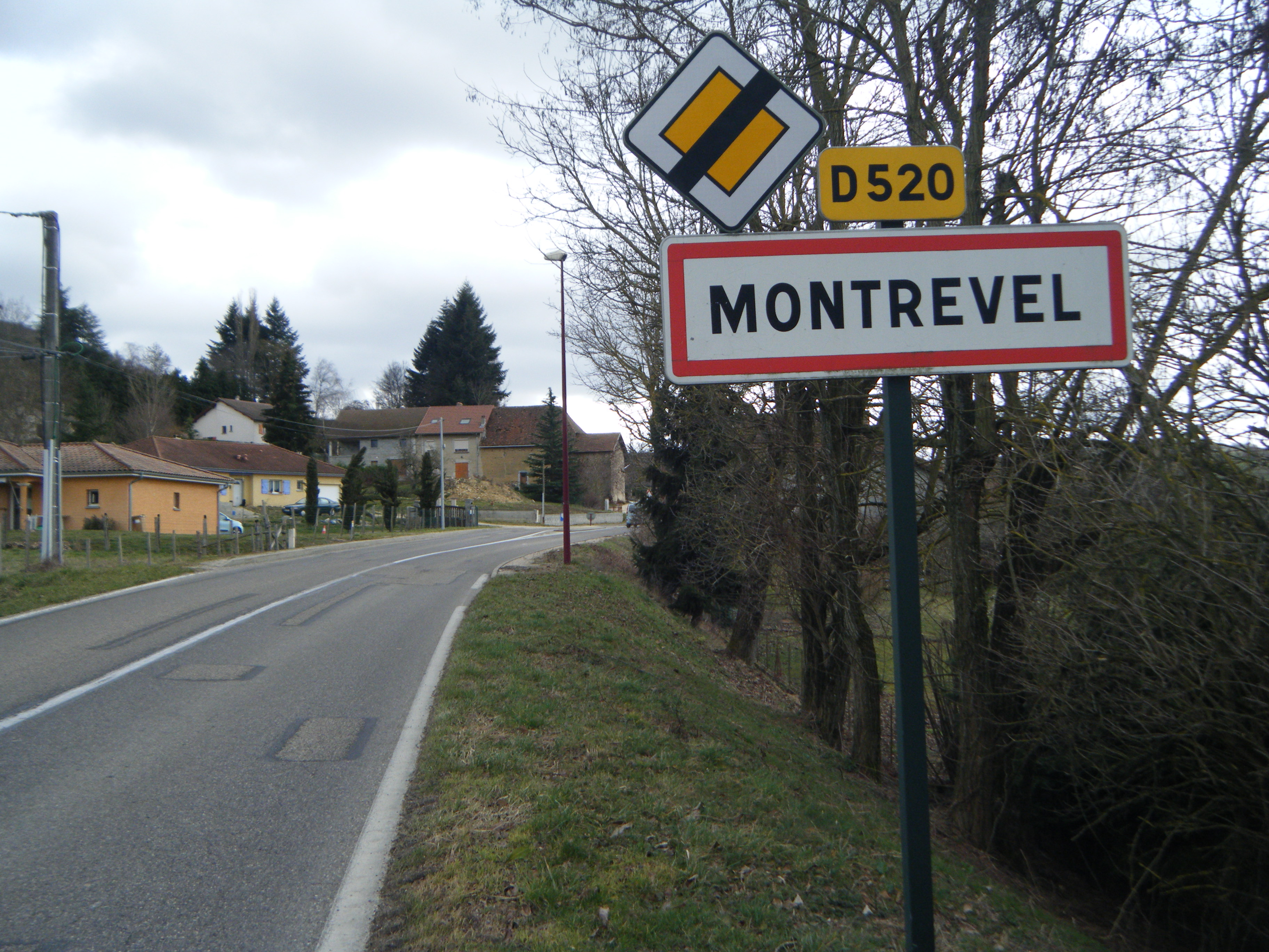 Panneau d'entrée de Montrevel (D520)